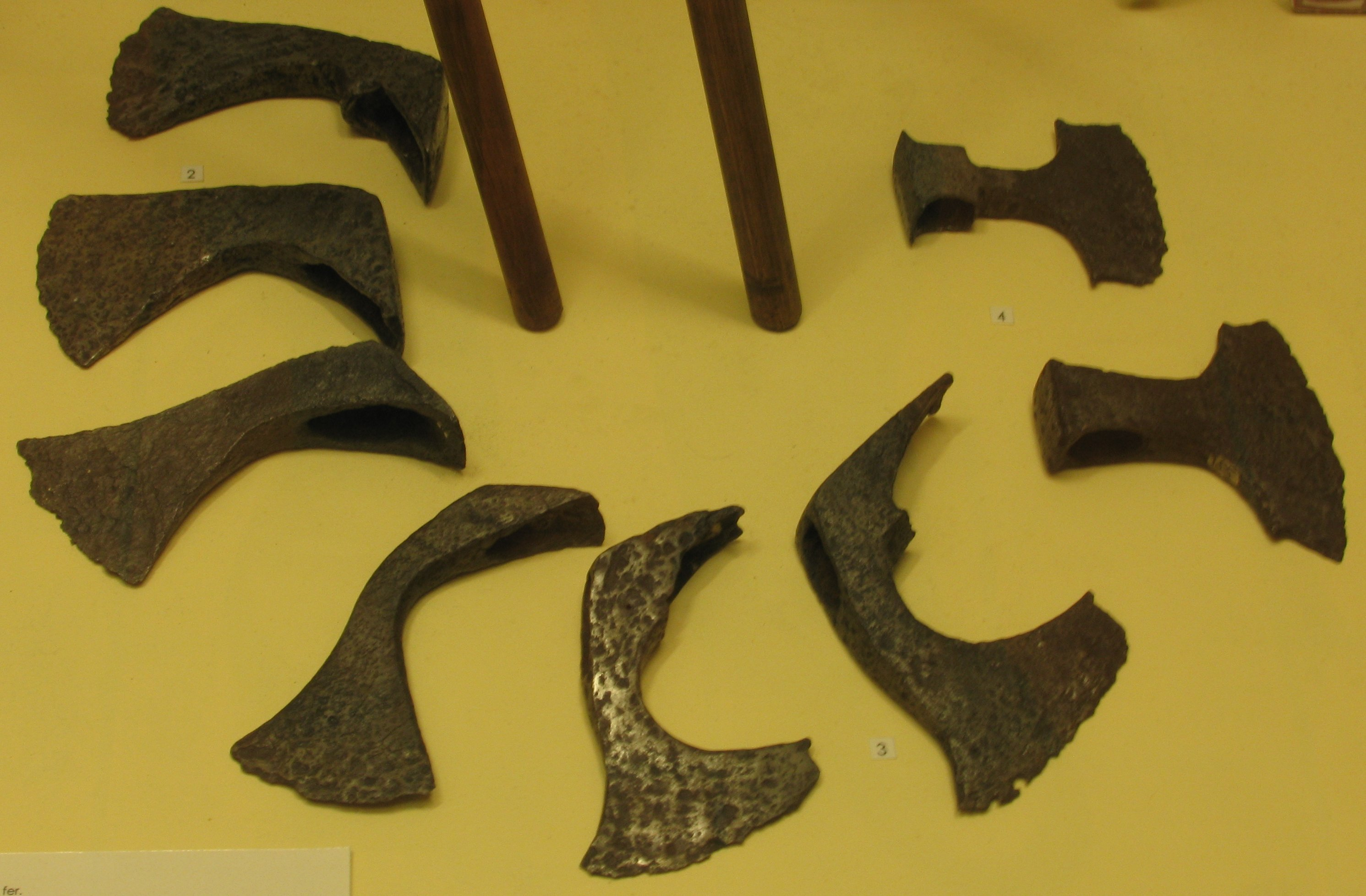 Haches et francisques, en fer, provenant des fouilles d'une nécropole mérovingienne à Brèves, Nièvre, France. Exposées au musée Romain-Rolland de Clamecy, Nièvre, France.